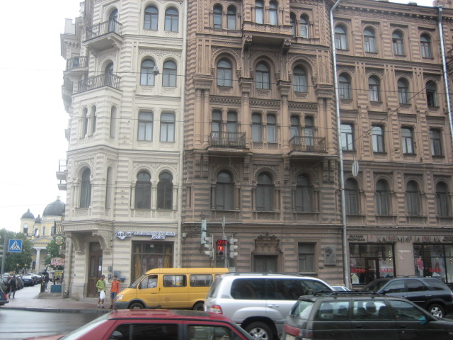 Дом Мурузи, Литейный проспект (Санкт-Петербург), Дом 24 (27 — по улице Пестеля), принадлежал князю Мурузи, использовался как доходный дом. В нем жили ряд деятелей русской культуры. Видна мемориальная доска И.Бродского.